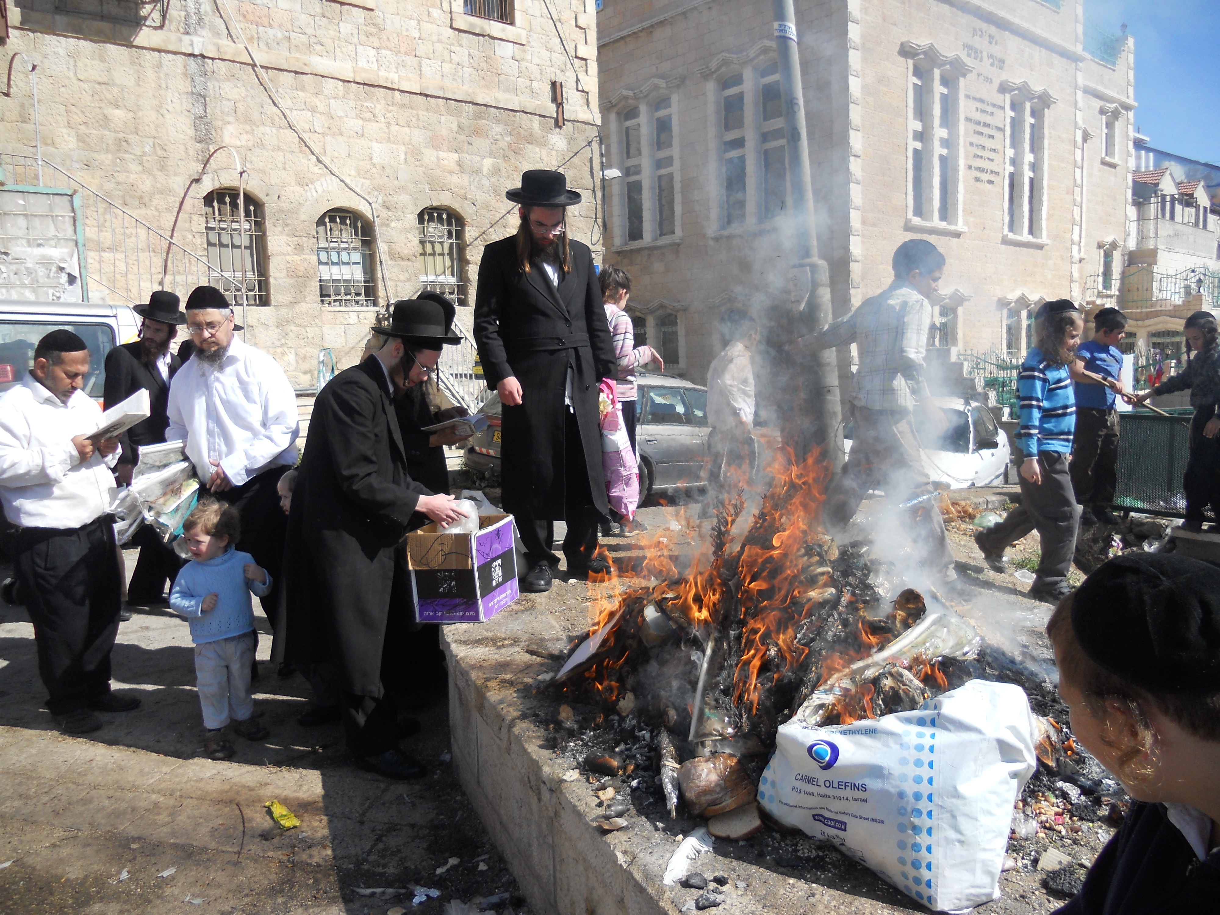 שריפת חמץ בשכונת בית ישראל בירושלים